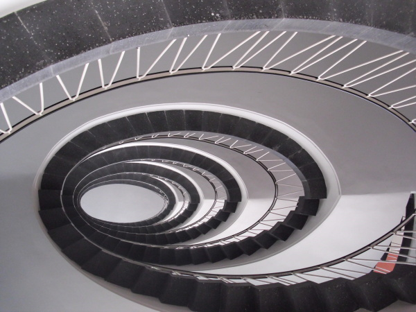 Neue Maxburg München Treppe